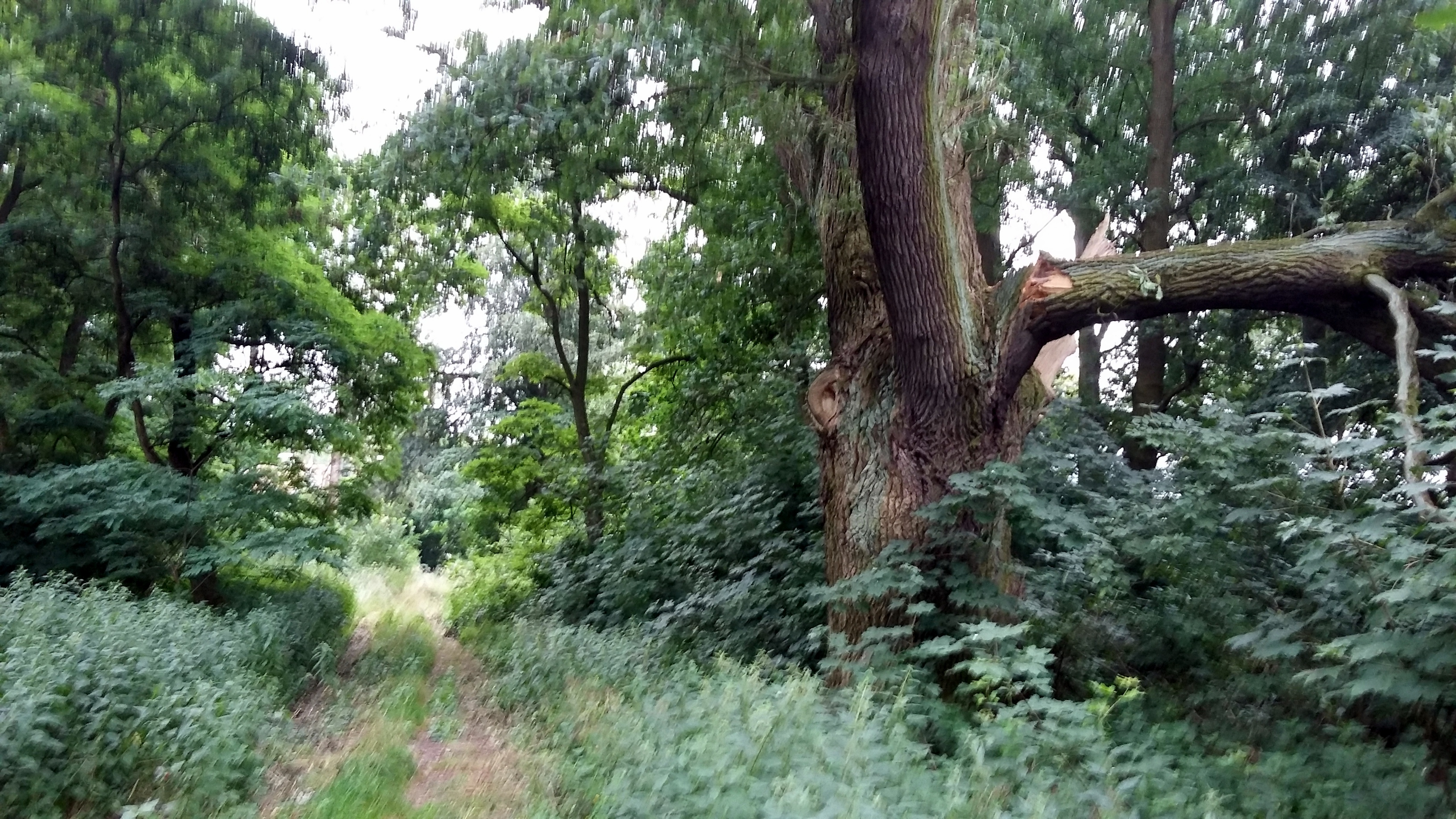 Widok od wejścia na park i dąb o obw. ok. 430 cm (Buszewo, park, XIX).